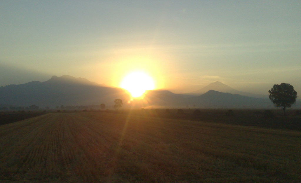 Vista del amanecer desde Míxquic hacia los volcanes Popocatépetl e Iztaccíhuatl (México).